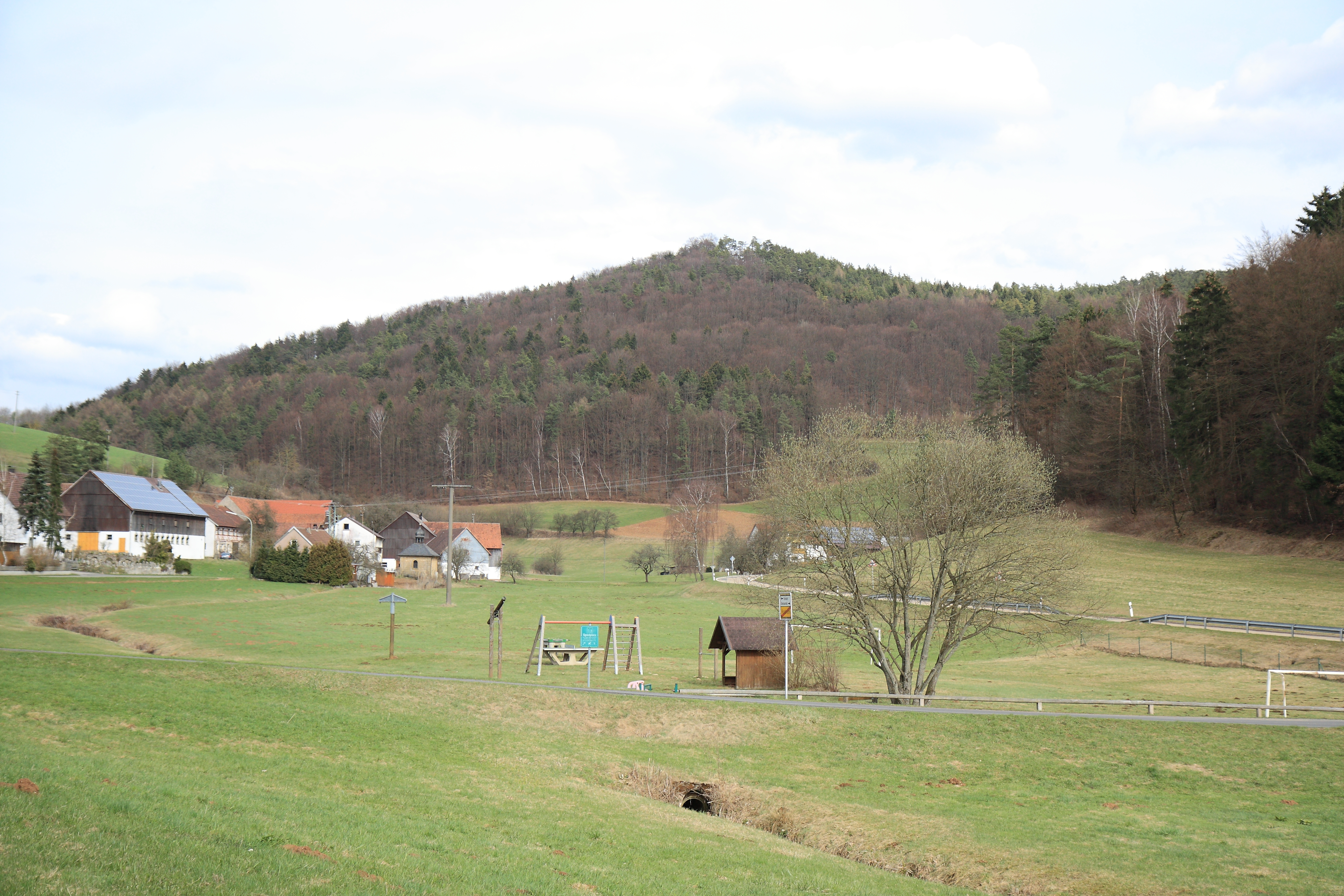 Ansicht des Burgstalls Wartberg über Kosbrunn aus westlicher Richtung